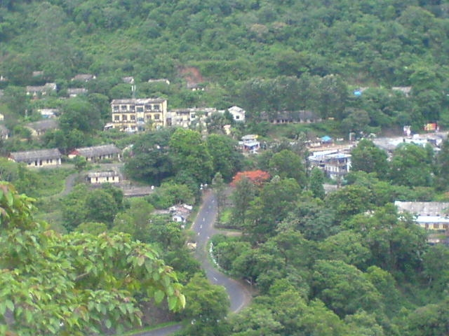 Painavu- Idukki District Headquarters (Kerala,South India)